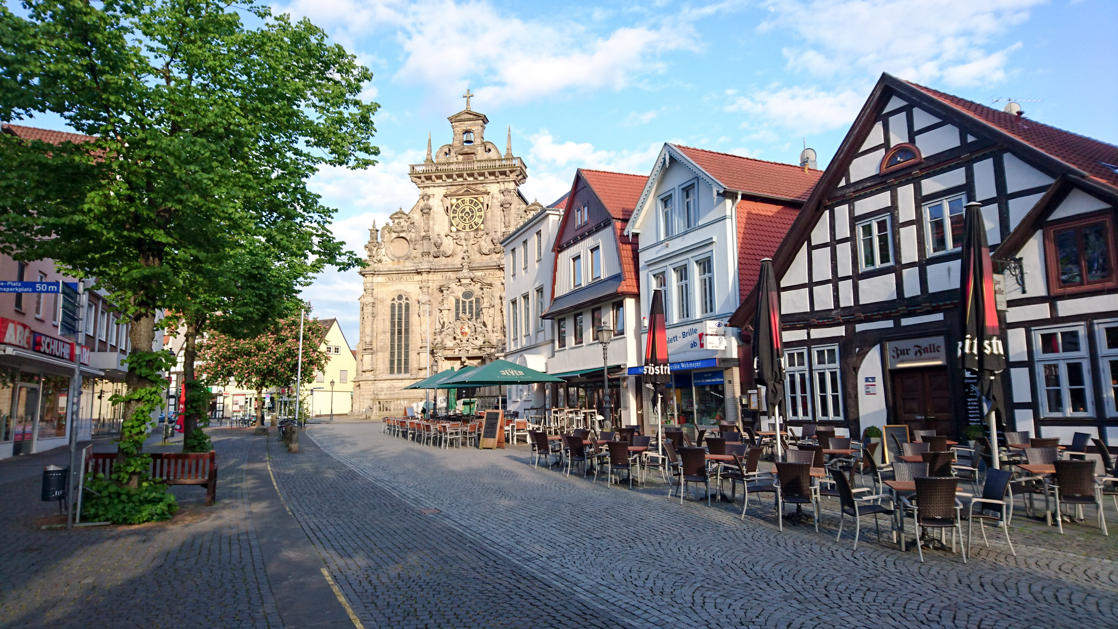 Fußgängerzone Bückeburg mit Blick zur Stadtkirche.